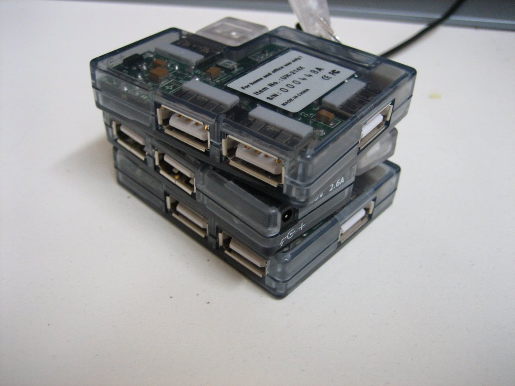 USB hubs